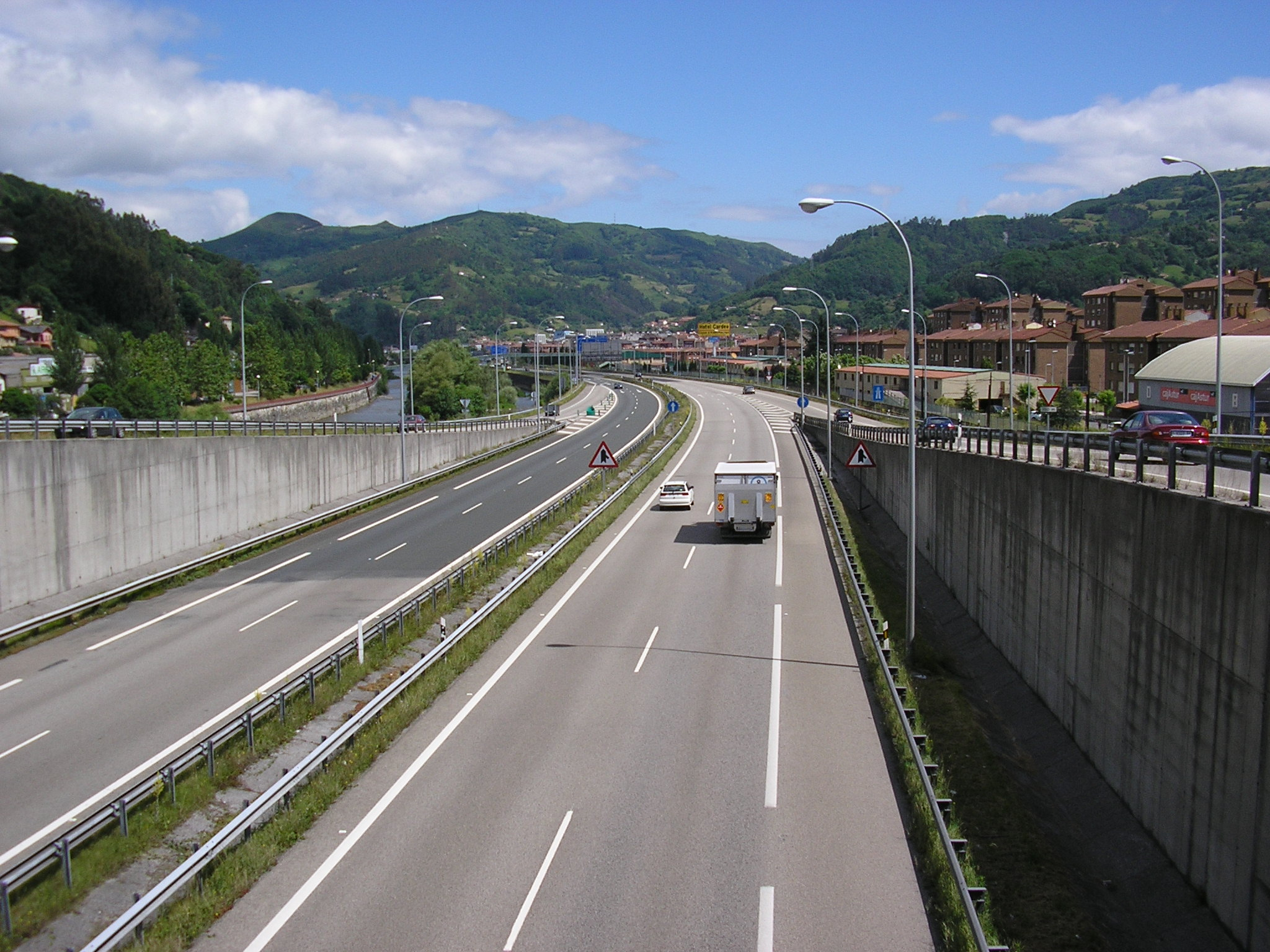 A-66